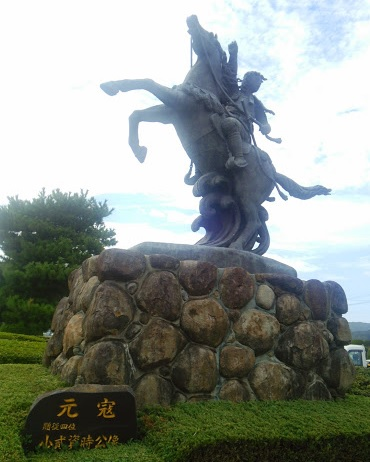 壱岐市芦辺フェリーターミナルにある少弐資時像